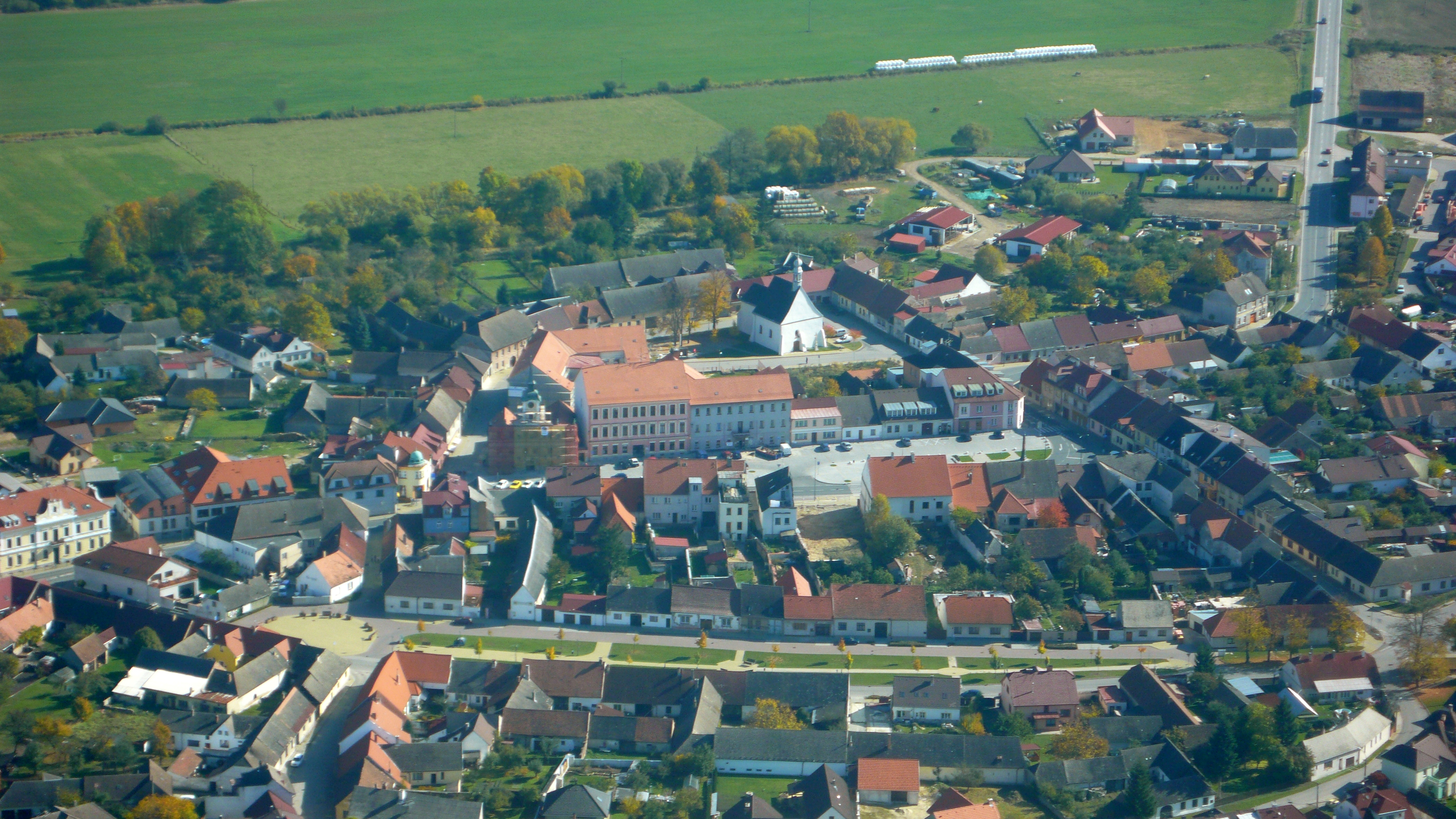 Lomnice nad Lužnicí